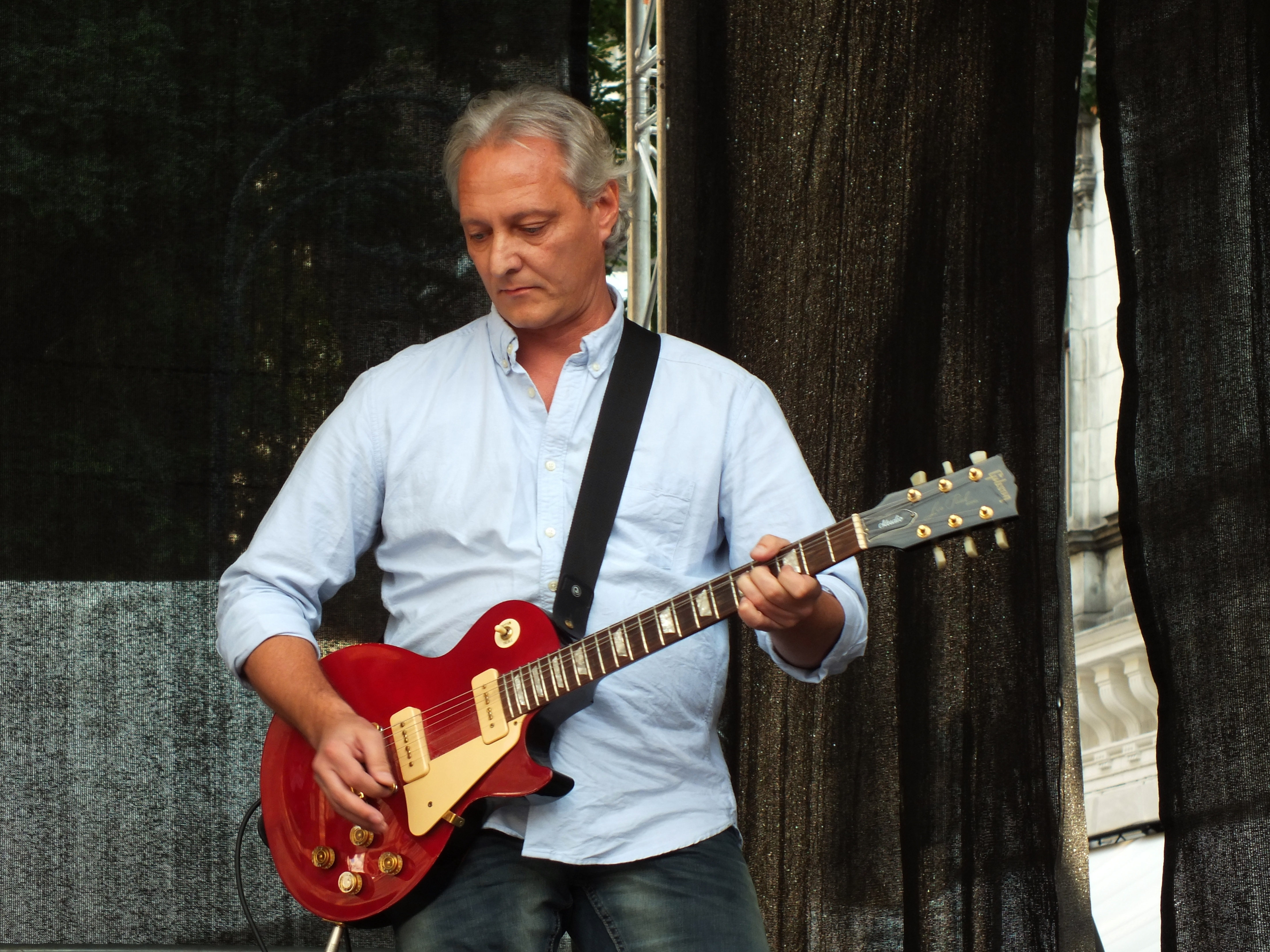 Fillár István színész, a Harmadik Figyelmeztetés színészzenekar szólógitárosa. 2013. szeptember 22., Budapest, Színházi Korzó az Andrássy úton